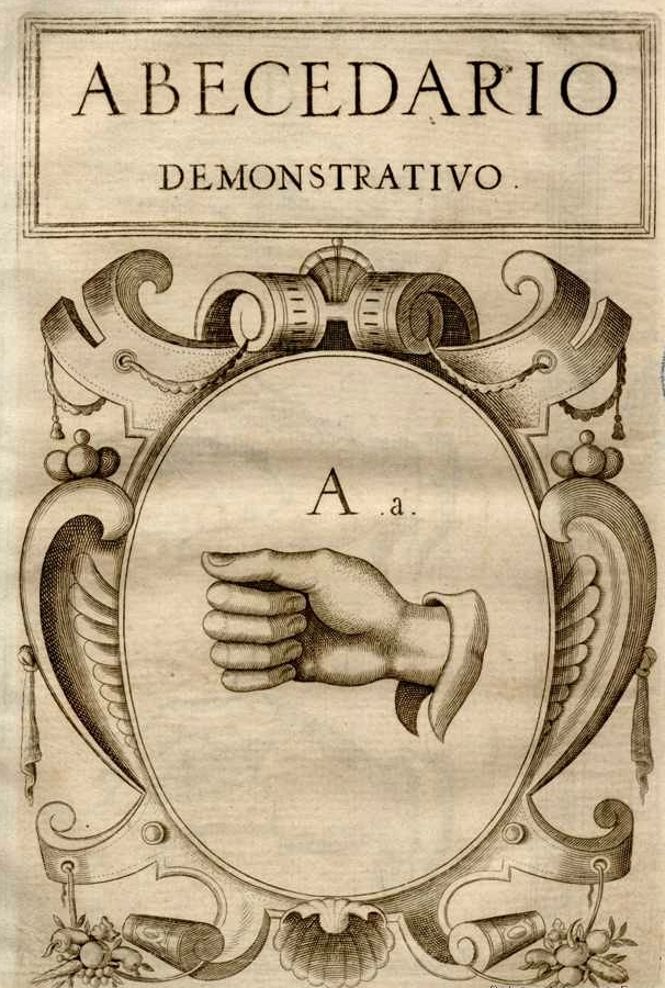 «Abecedario demonstrativo» de Reducción de las letras y arte para enseñar a hablar los mudos, Biblioteca Nacional de España, de Juan Pablo Bonet. 8 Láminas con grabados calcográficos insertos entre las páginas 130 y 131.